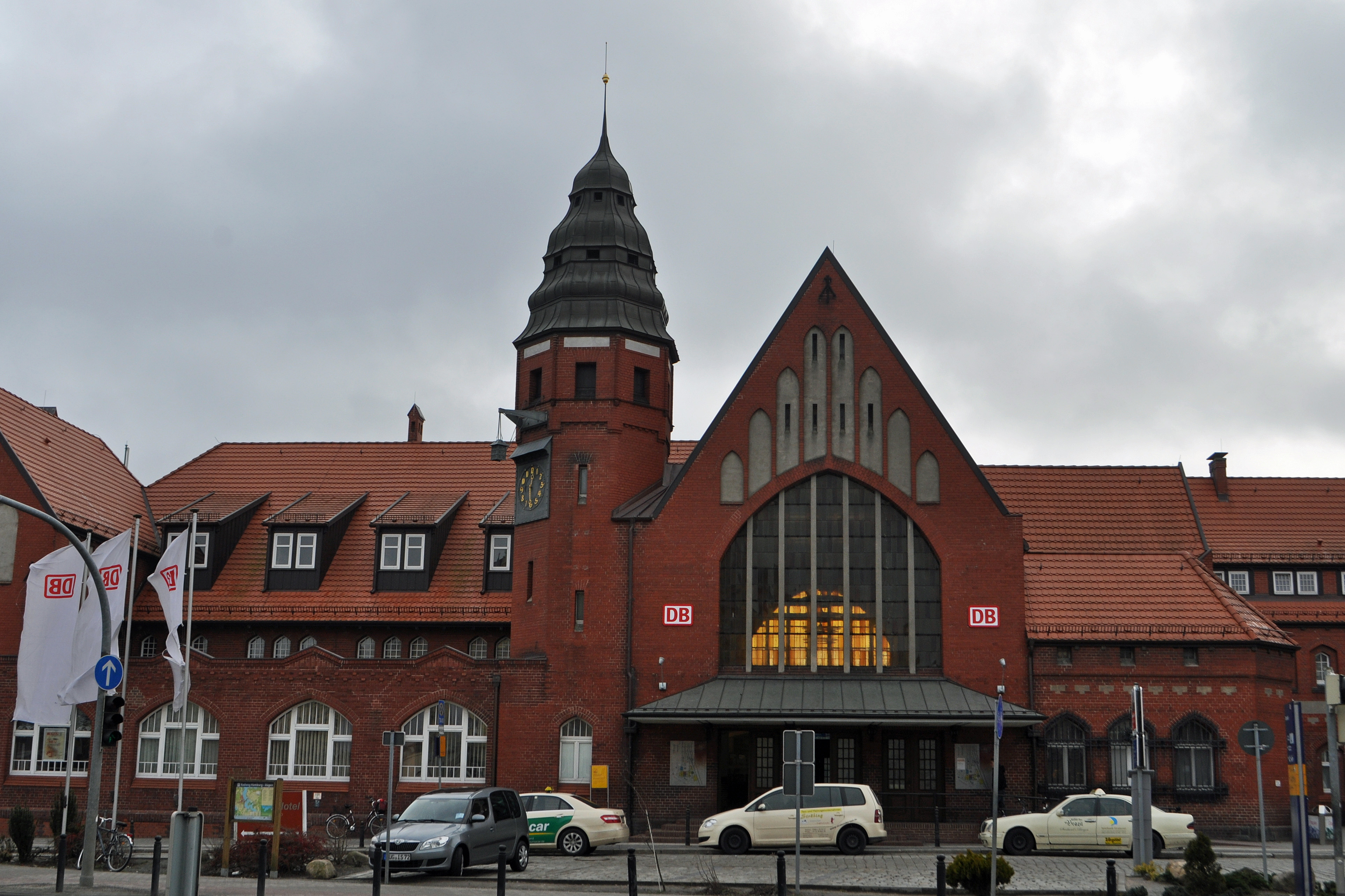 Stralsund, Hauptbahnhof (2013-02-03), by Klugschnacker in Wikipedia (88)